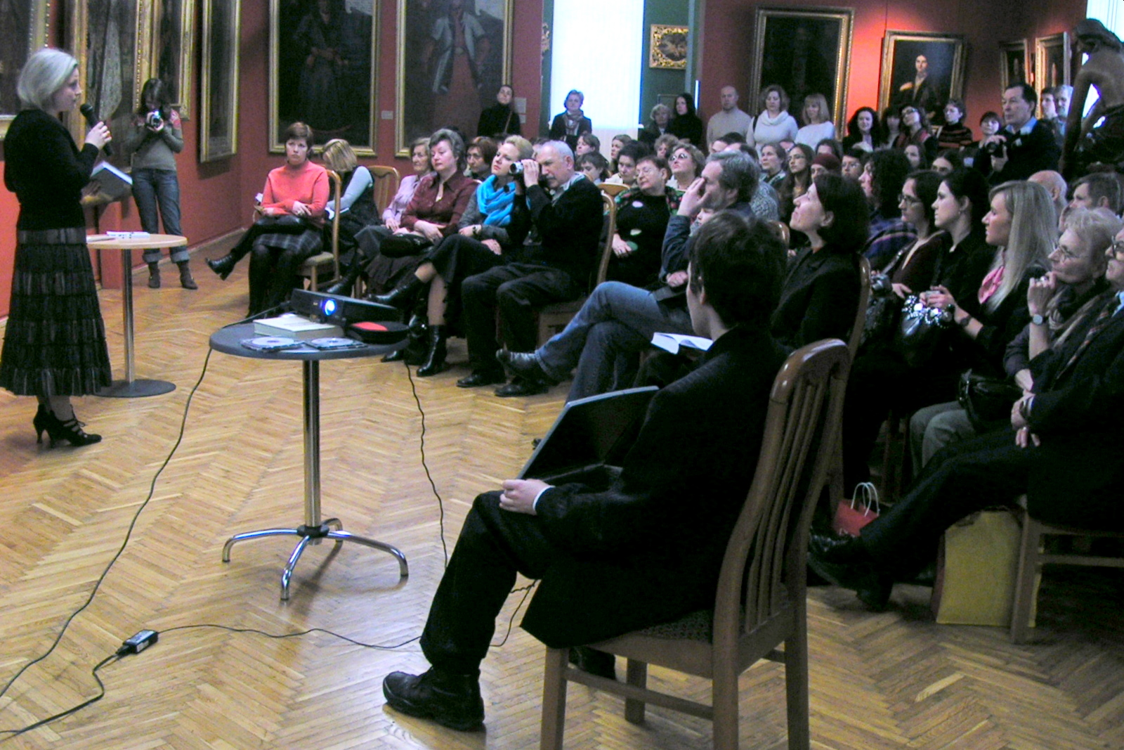 Evening of memory of Vadim Klevayev in the National Art Museum of Ukraine. 2007Вечер памяти В. М. Клеваева в в Национальном художественном музее Украины.О книгах рассказывает Ярослава Хоменко.2007